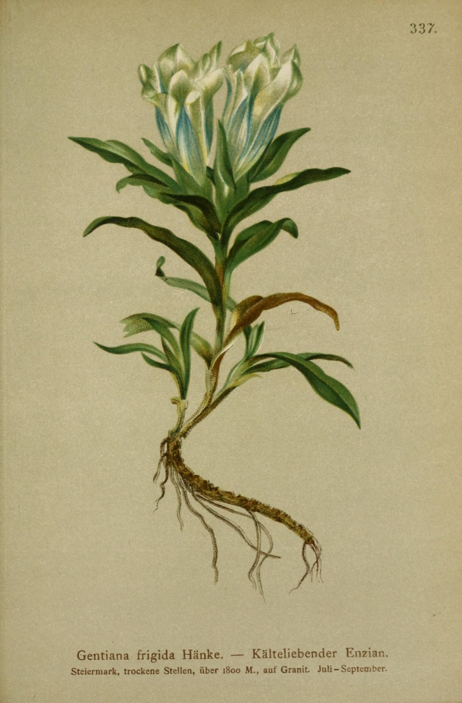 337. Gentiana frigida Hänke. — Kälteliebender Enzian. Steiermark, trockene Stellen, über 1800 M., auf Granit. Juli -September.